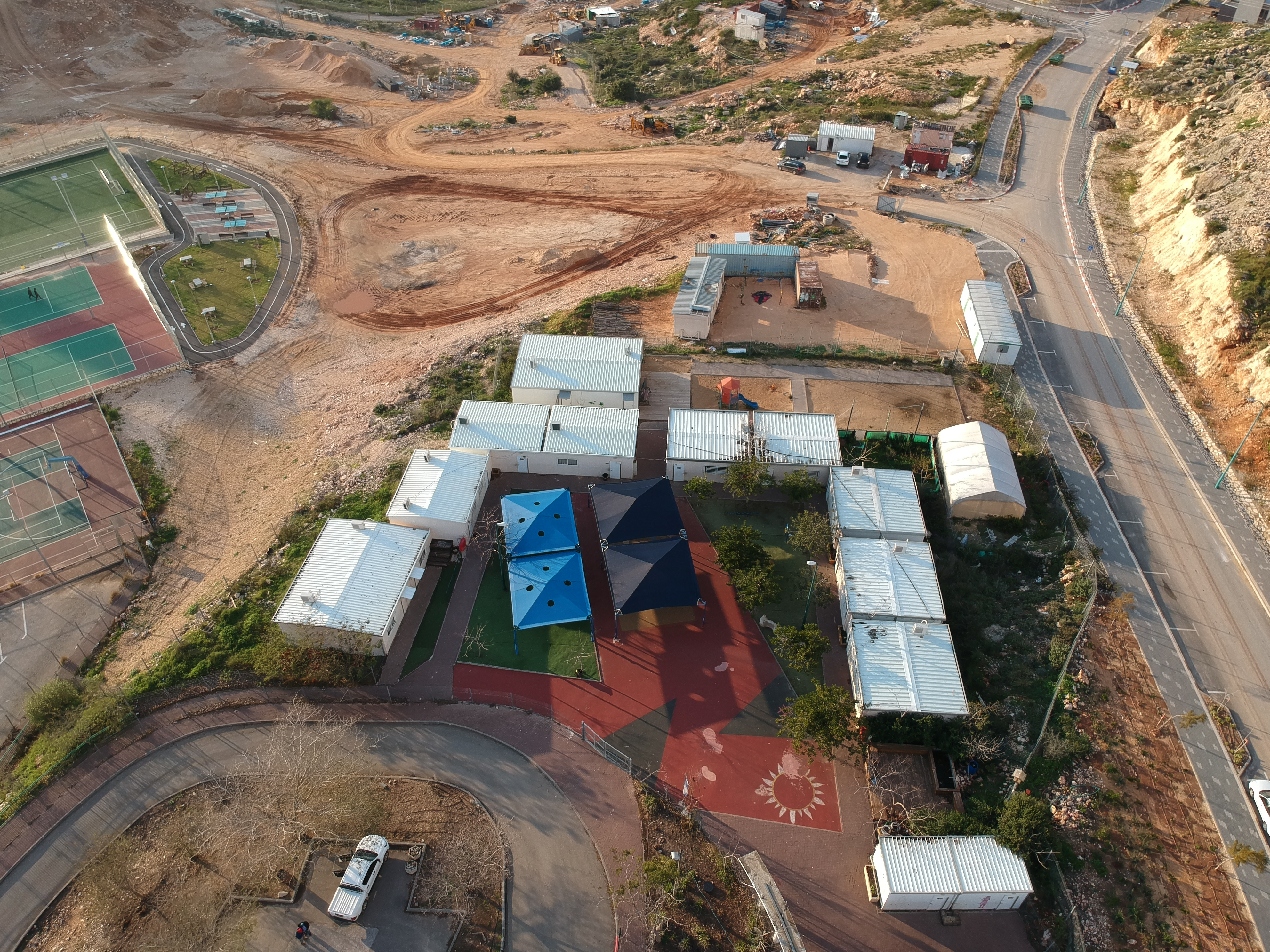 שירותי המועצה ינתנו במיקום חדש במערב בנימין ביישוב נעלה